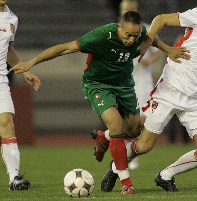 Houssine Kharja